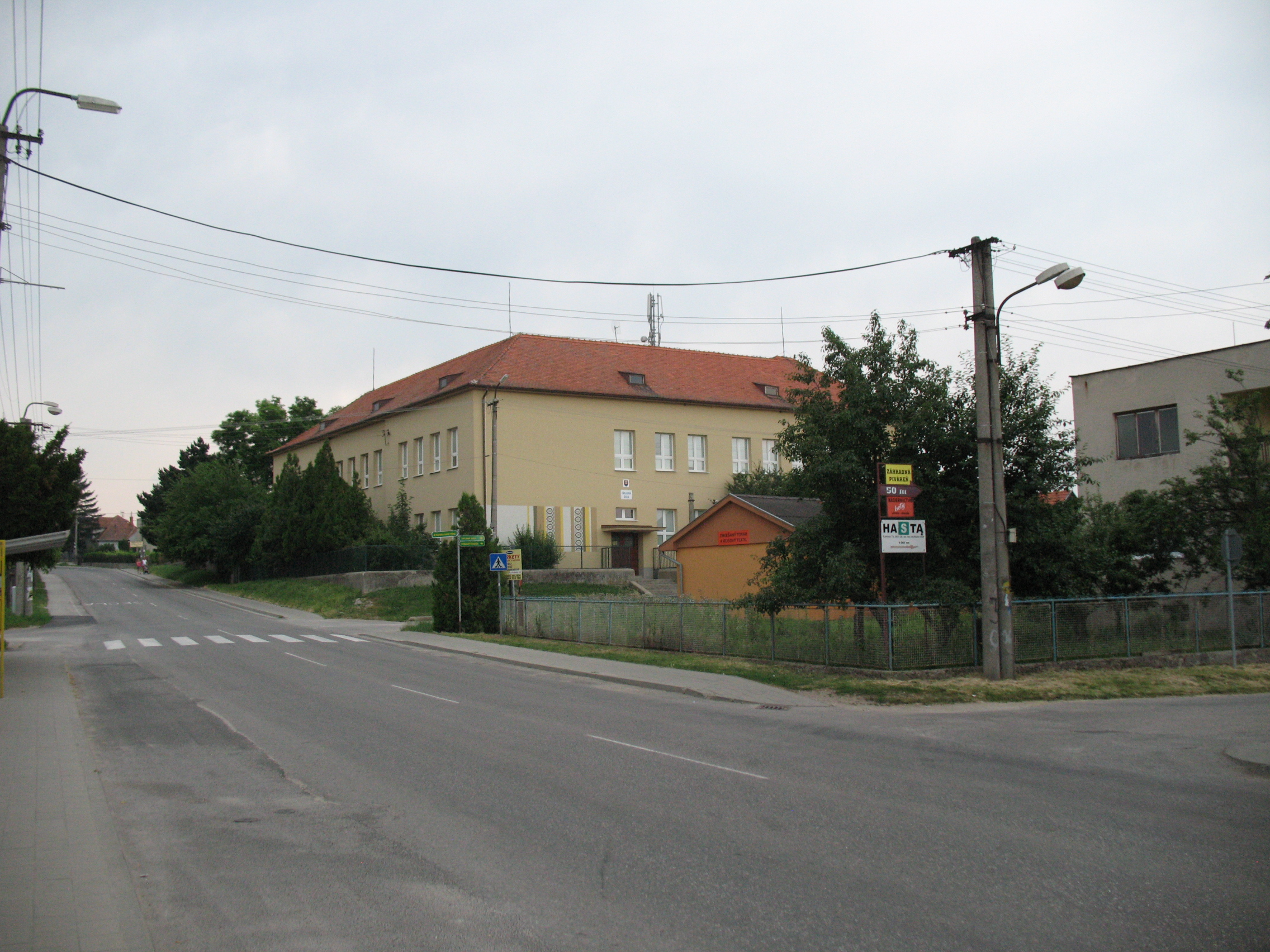 Abaszállás templom